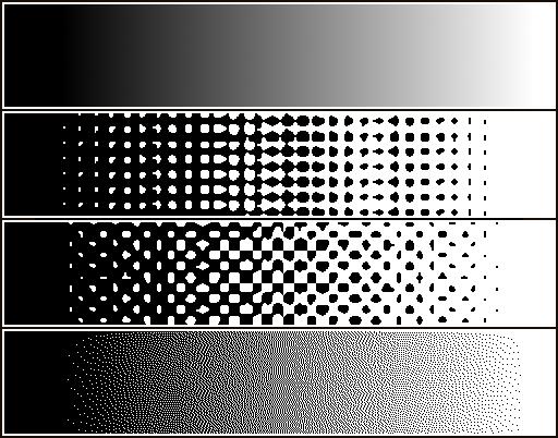 Umwandlung von Halbtonbilder in Schwarz/Weiß Bilder durch Rasterung.